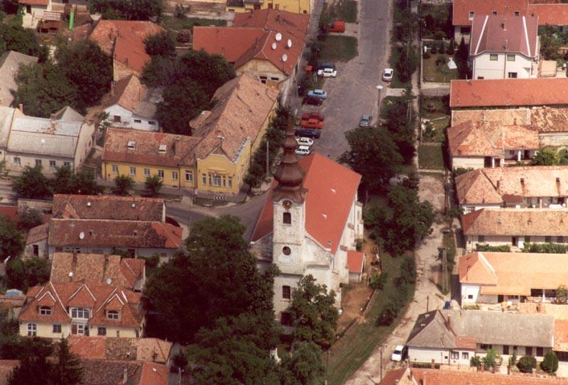 Páty légifotó, református templom